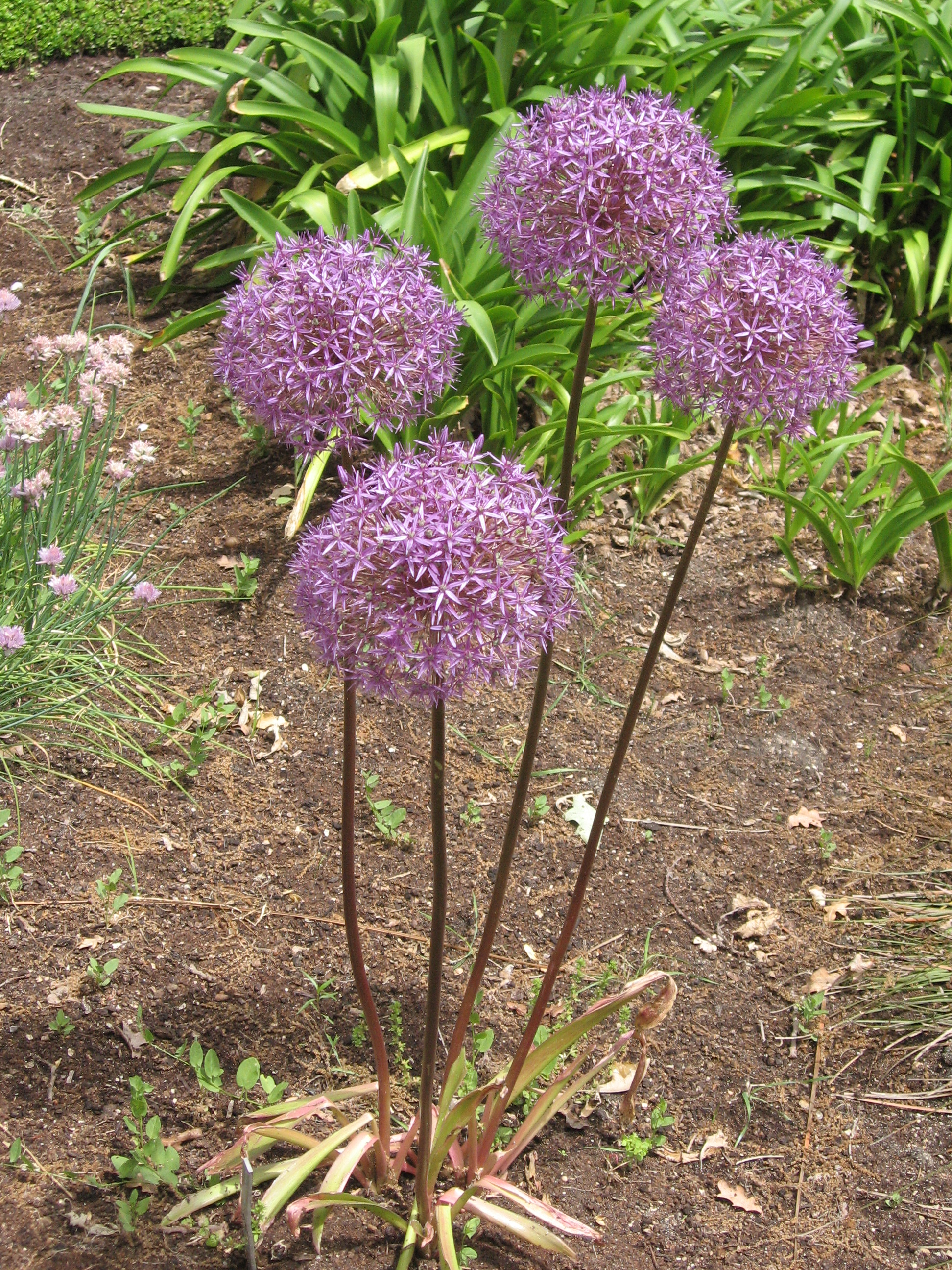 Allium giganteum. Real Jardín Botánico de Madrid.